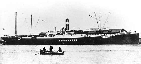 S/S Ingrid Horn